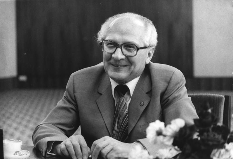 ADN-ZB / 24.7.87 / Berlin: Der Generalsekretär des ZK der SED und Vorsitzende des Staatsrates der DDR, Erich Honecker, während eines Interviews für die schwedische Tageszeitung "Dagens Nyheter" am 19.6.1986